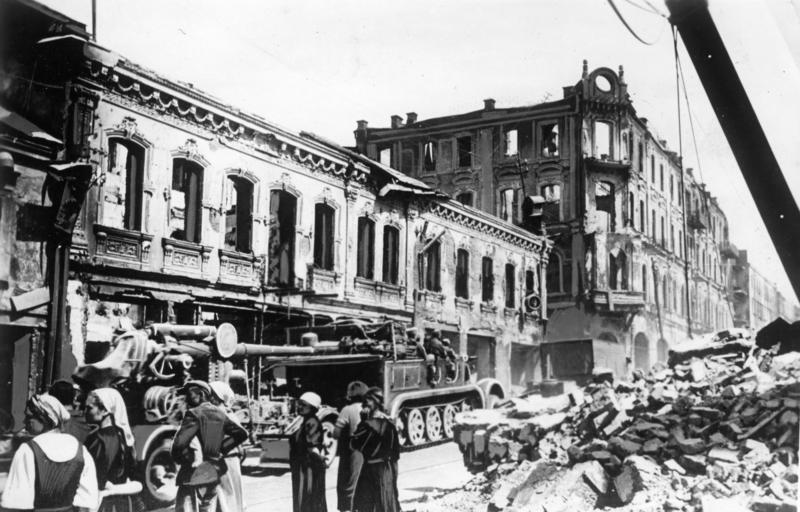 Scherl: An der Sowjetfront: Ruinen der Provinzhauptstadt Minsk. PK-Aufnahme: Kriegsberichter: Cusian (Sch.) 7057-41 "Fr." "Fr.OKW" Juli 41 Information added by Wikimedia users.Беларуская (тарашкевіца): Руіны ў Менску, Беларусь. Ліпень 1941 году. Нямецкая тэхніка праяжджае скрыжаваньне вуліцаў Савецкай (цяпер — пр. Незалежнасьці) і Энгельса ў кірунку Дома ўраду.